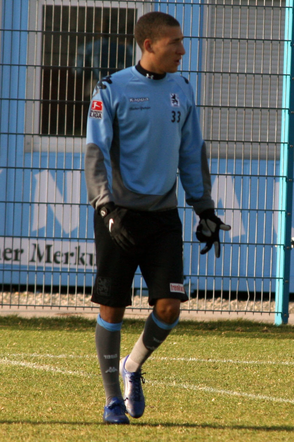 Fabian Johnson, player of TSV 1860 München, training, 20.01.2007, Grünwalder Str., Munich